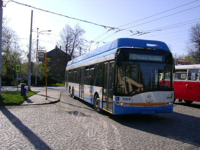 Trolejbus Solaris Trollino 15 AC III.generace e.č.3604 v smyčce Michálkovice.